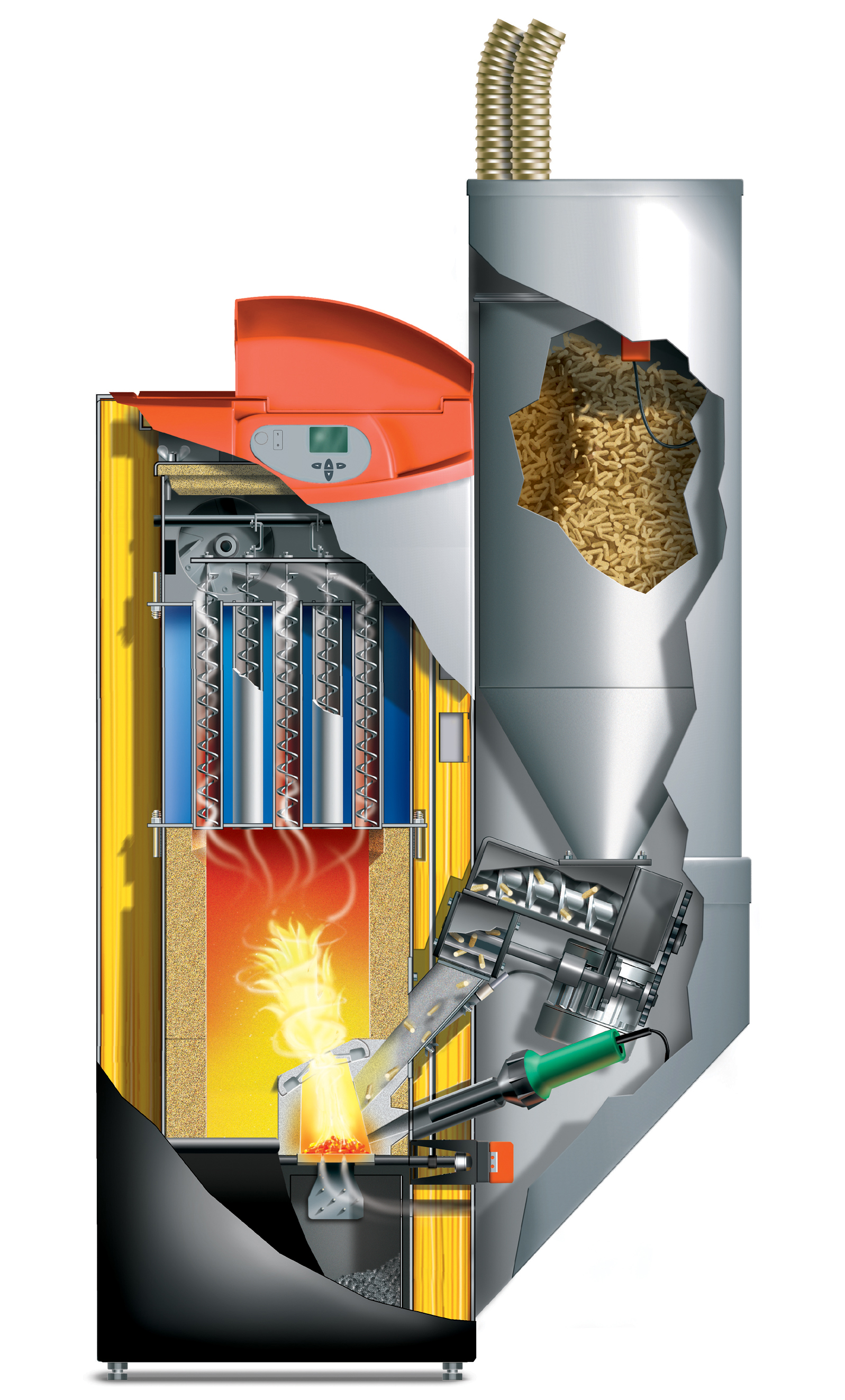 Schnittbild einer Pelletheizung (Biostar) mit Saugzuggebläse.